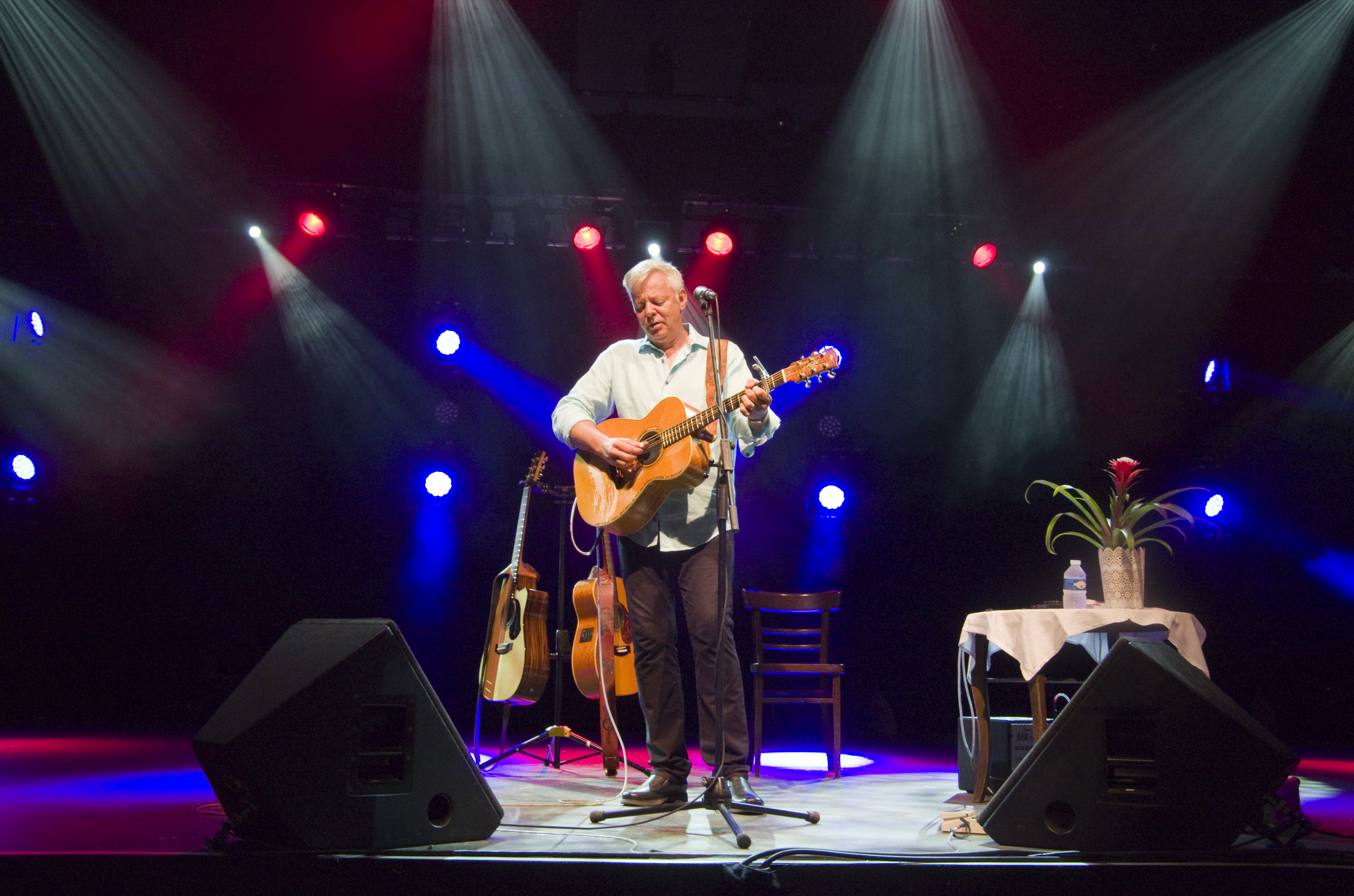 Das Zelt-Musik-Festival 2015 in Freiburg im Breisgau. 05.07.2015 Tommy Emmanuel